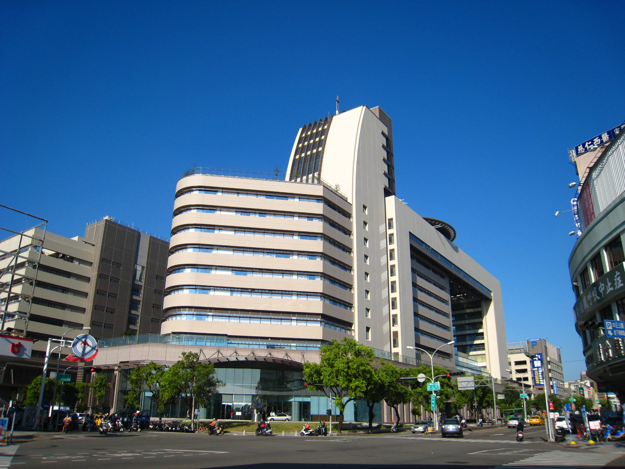 中國醫藥大學附設醫院急重症中心大樓。